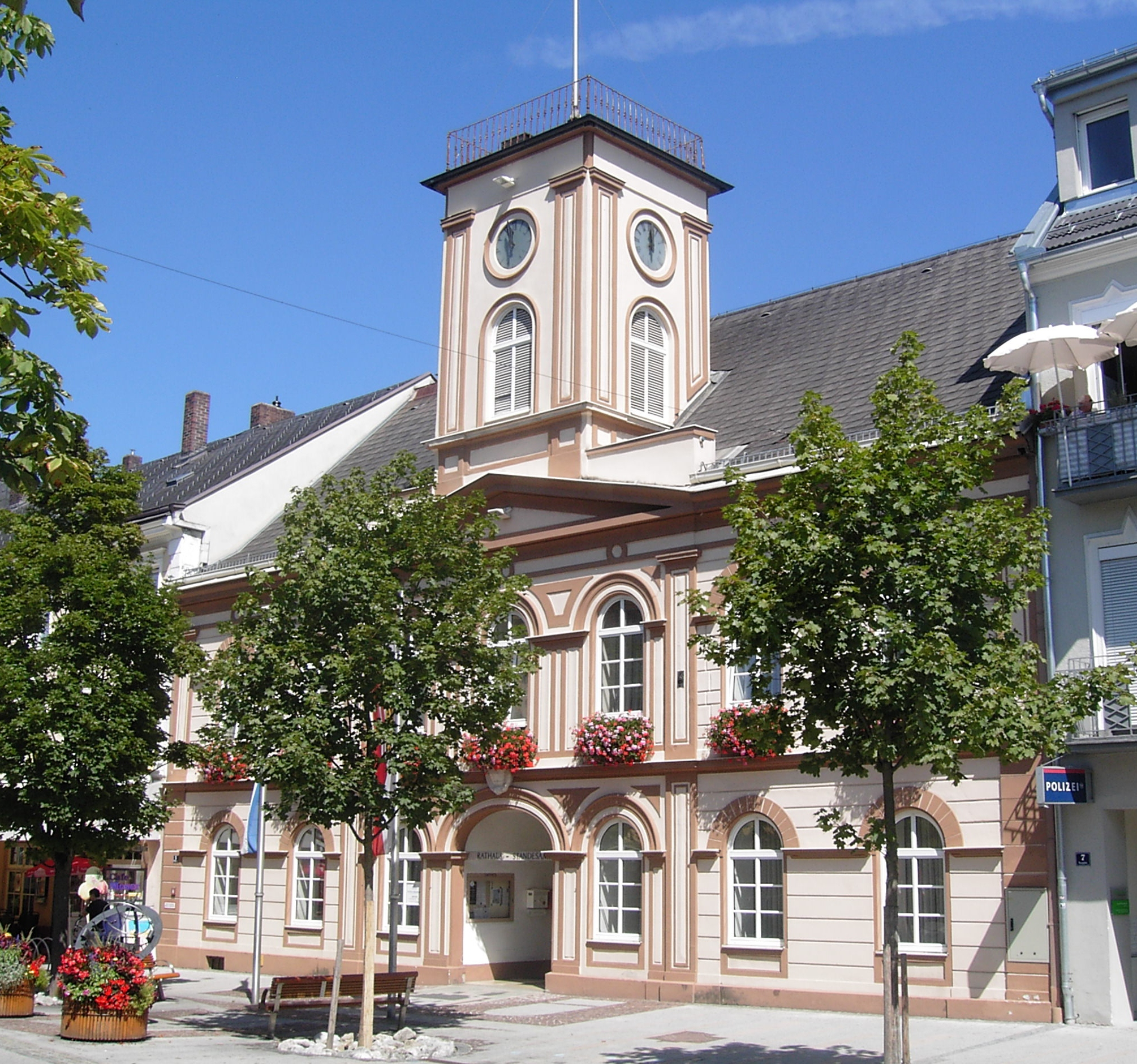 Bad Hall Hauptplatz Hauptplatz 5, Ansicht Fassade Hauptplatz